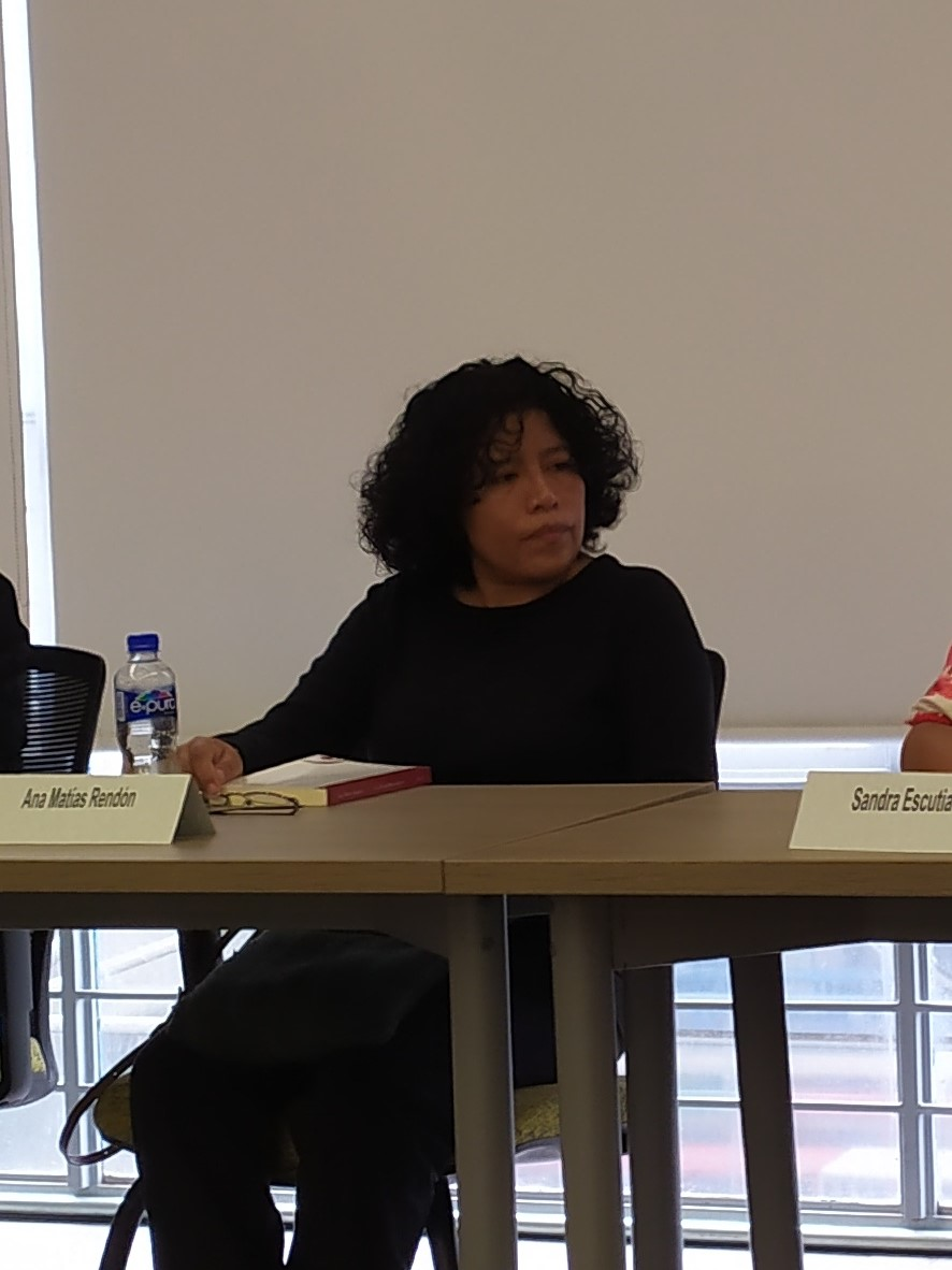 Ana Matías Rendón en la presentación del libro La discursividad indígena 2019